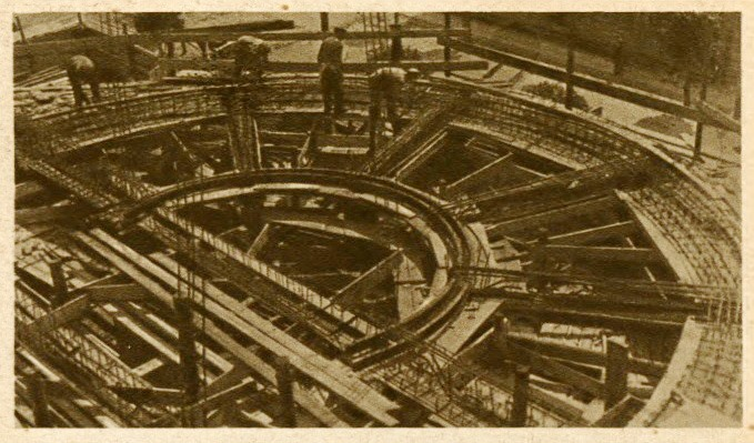 Беларуская (тарашкевіца): Менск (Miensk), рог вуліц Кашарскай (vulica Kašarskaja) і Ўнівэрсытэцкай (vulica Ŭniversyteckaja). Цэнтральная бібліятэка, будоўля